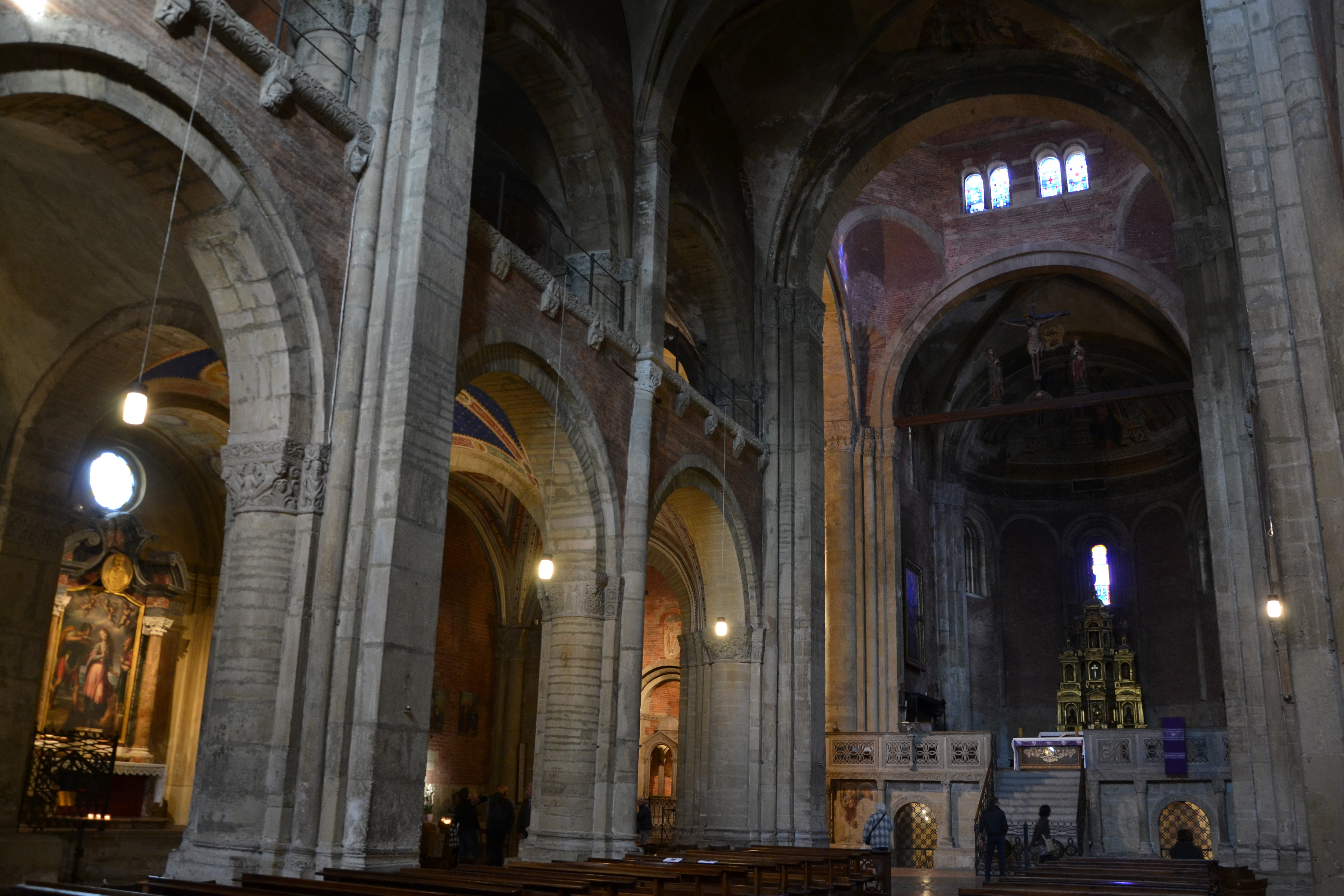 San Michele Maggiore (Pavia)